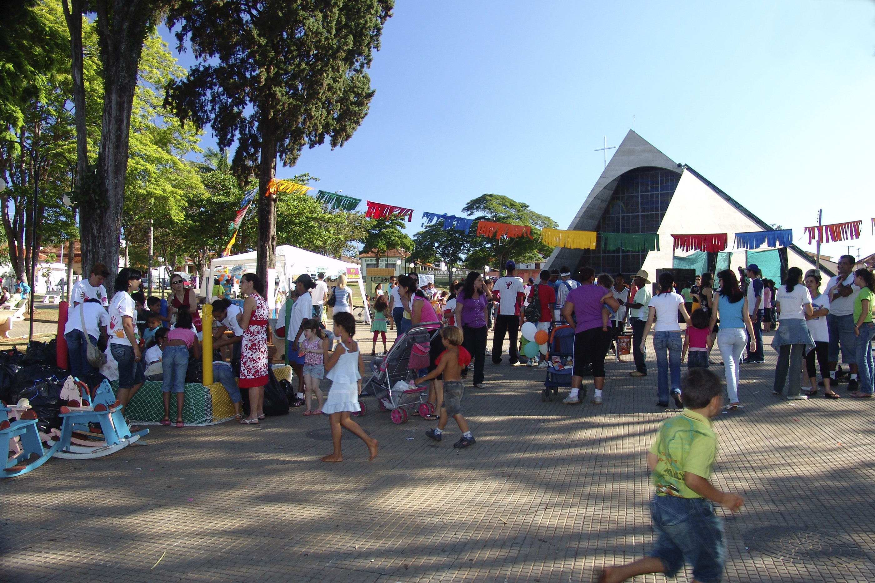 Festa na praça em Cerqueira César, São Paulo, Brasil.